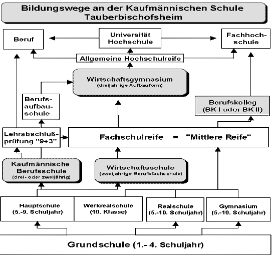 Bildungswege: Schularten und Schulabschlüsse an den Voll- und Teilzeitschulen der Kaufmännischen Schule Tauberbischofsheim. Vollzeitschulen: - Zweijährige Berufsfachschule Wirtschaft (2BFW), früher Wirtschaftsschule (WS) - Kaufmännisches Berufskolleg I und II (BK I u. II) - Wirtschaftsgymnasium (WG) Teilzeitschulen: - Kaufmännische Berufsschule (KBS), verschiedene kaufmännische Ausbildungsberufe bzw. Berufsfelder